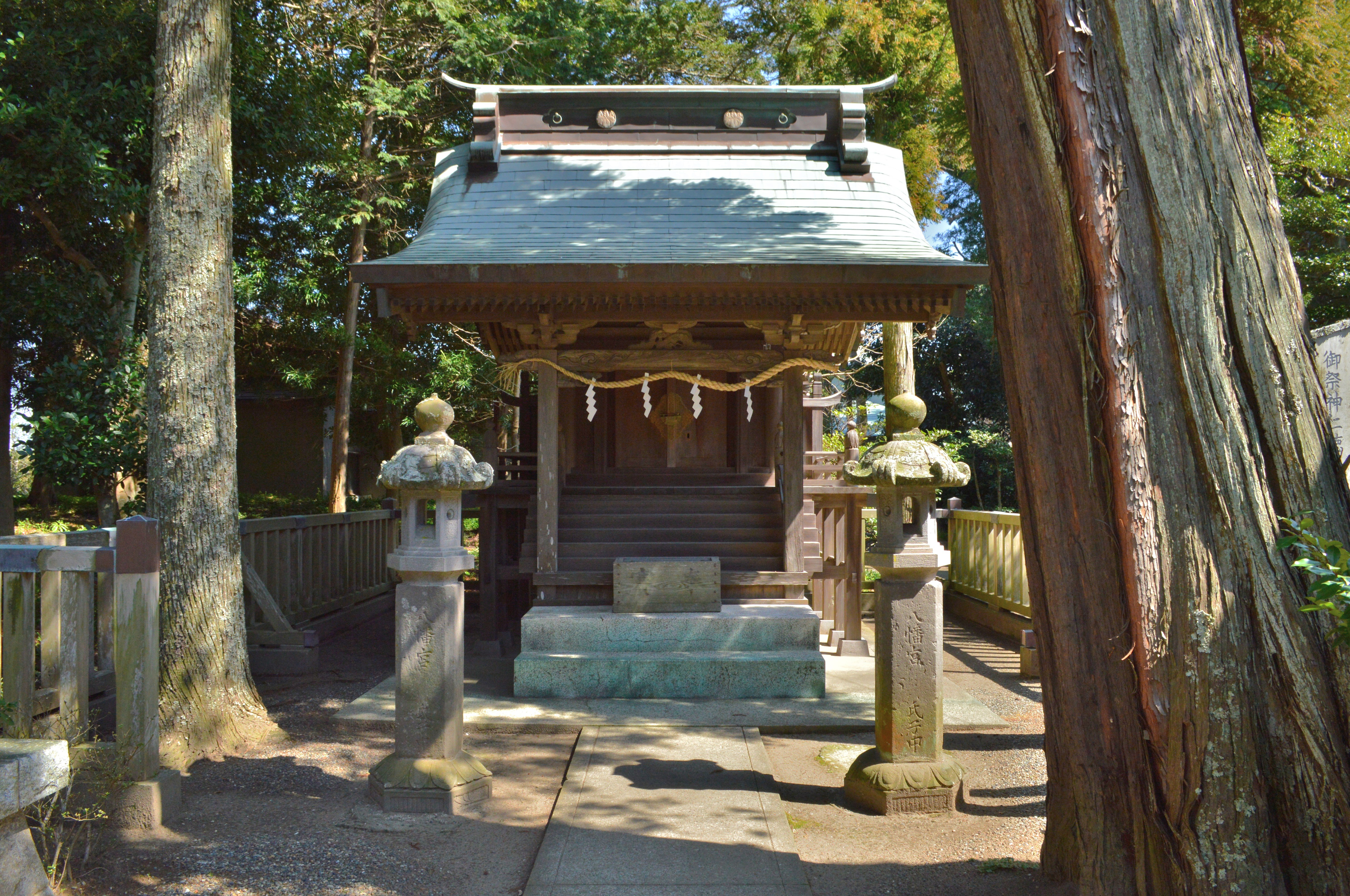 鶴谷八幡宮境内 若宮八幡社